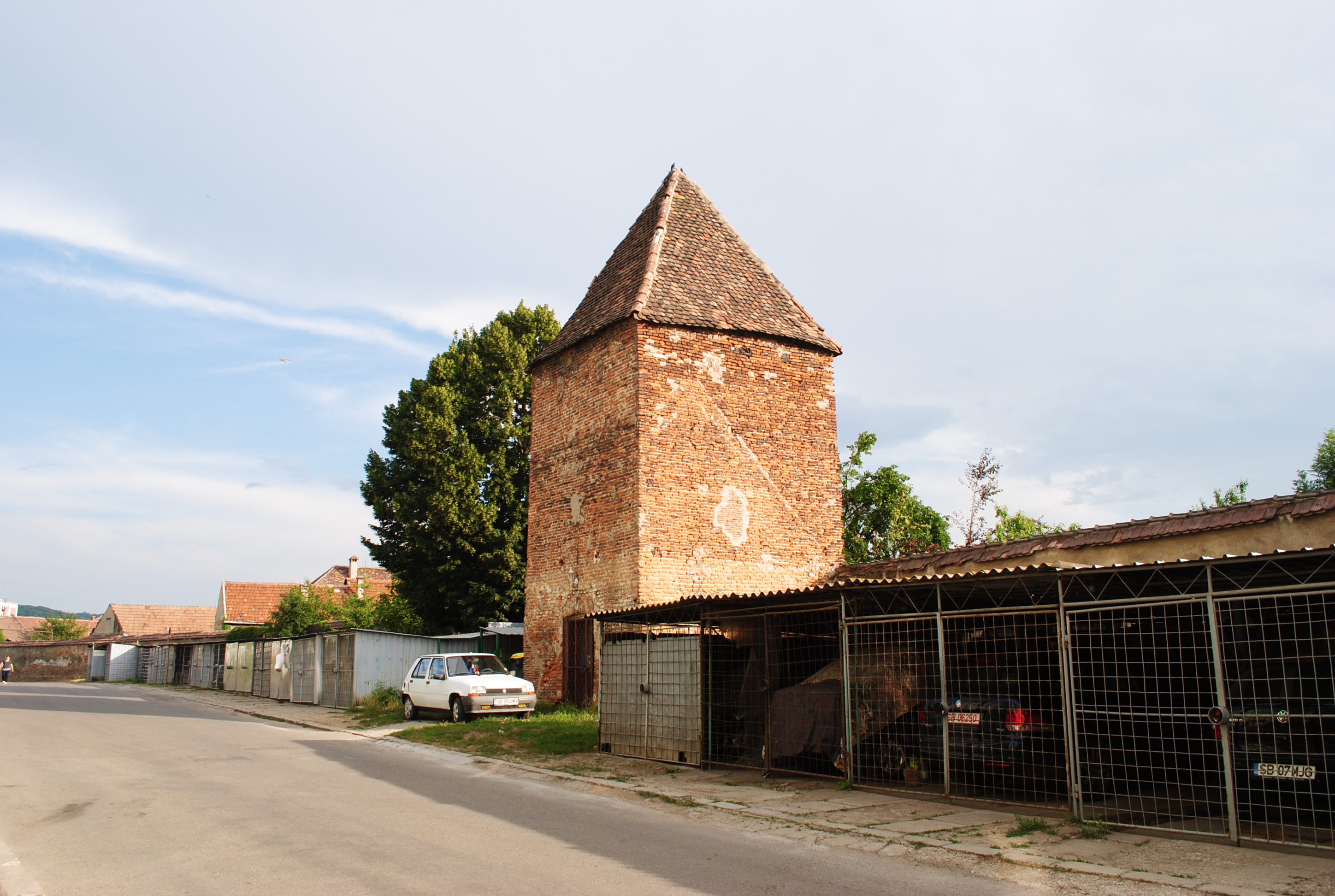 Ansamblul fortificațiilor orașului medieval, sec. XV - XVII